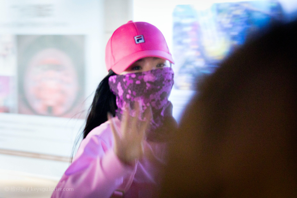 中文（中国大陆）: 2016.3.28《非凡搭档》广州站录制